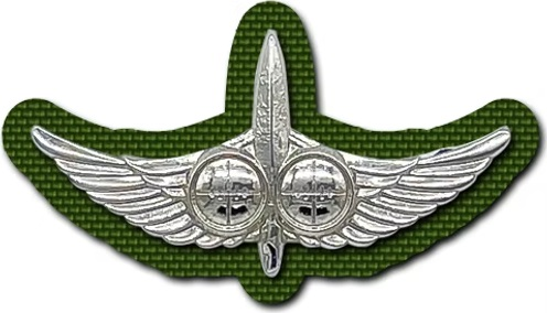 סיכת לוחם האיסוף הקרבי